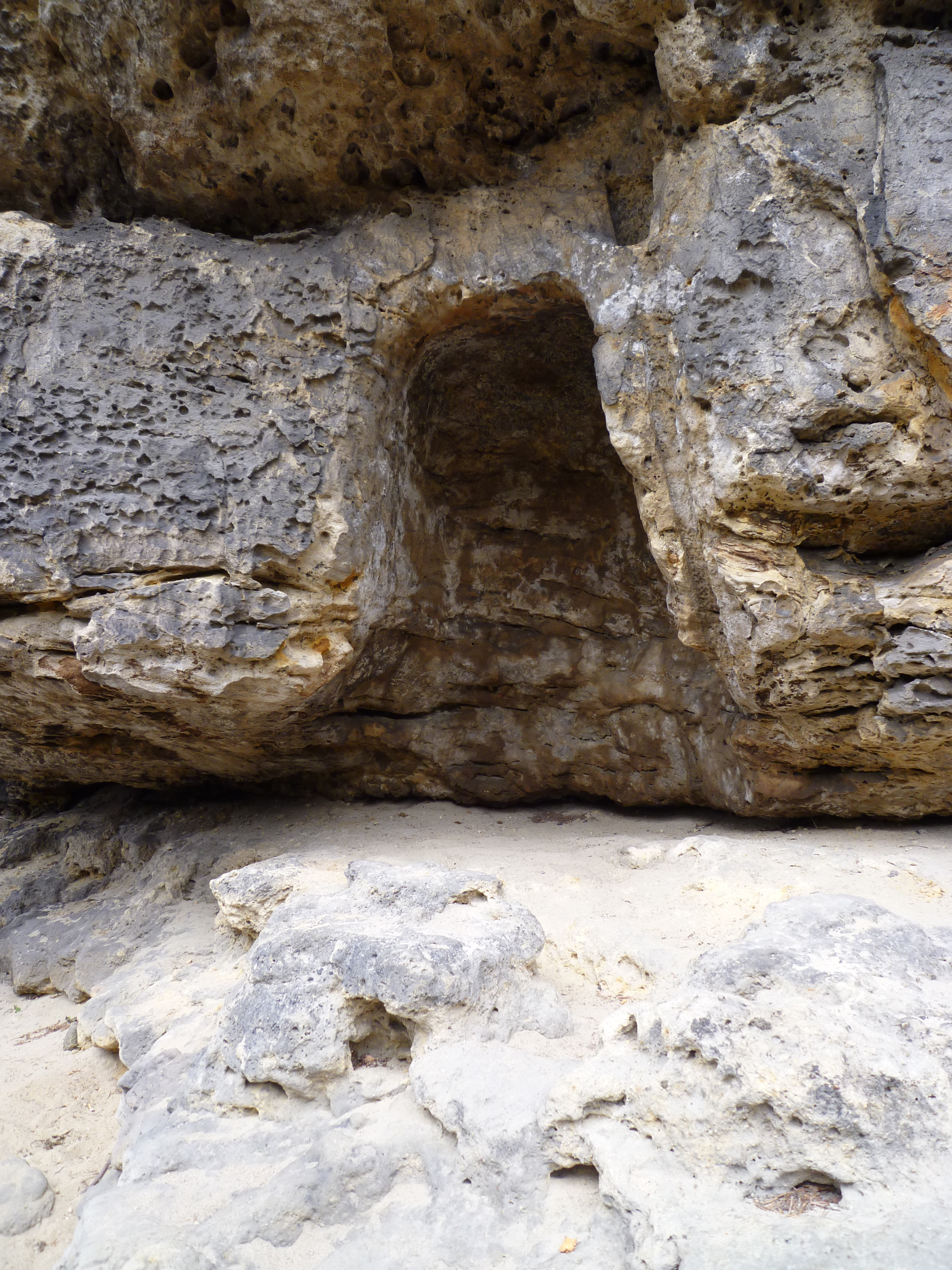 Wächternische am Winterstein